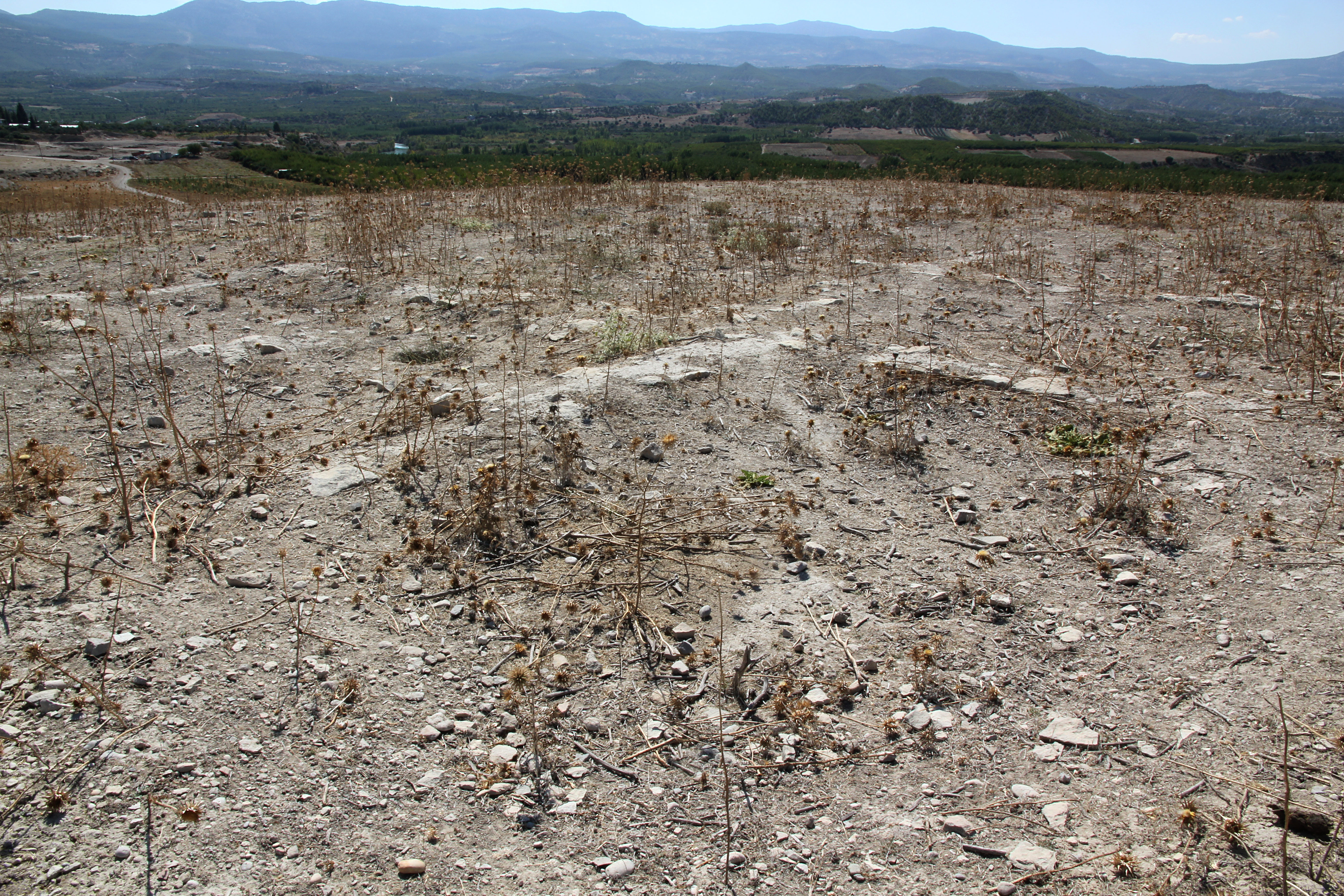 Kilise Tepe, hethitischer Siedlungshügel nahe Mut, Südtürkei, Grundmauern